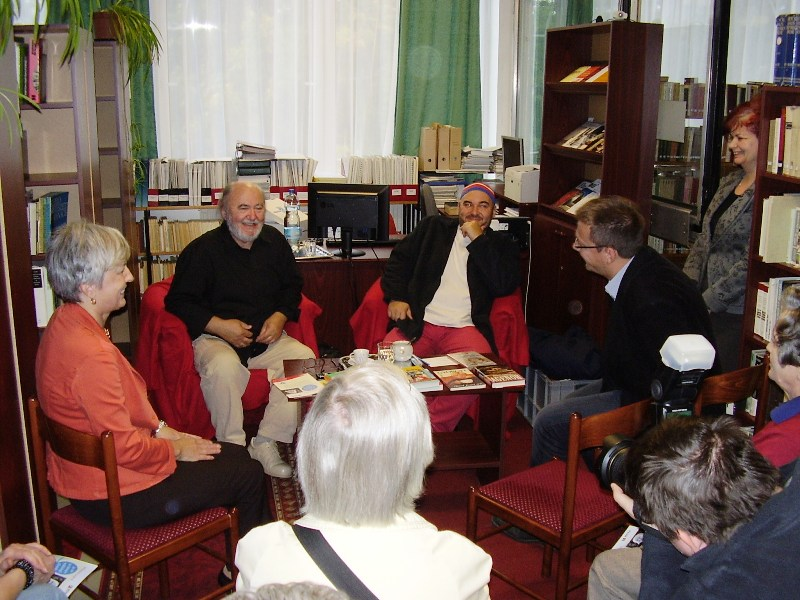 Nógrádi Gábor és Nógrádi Gergely író-olvasó találkozón Kazincbarcikán. Egressy Béni Városi Könyvtár olvasóterme.